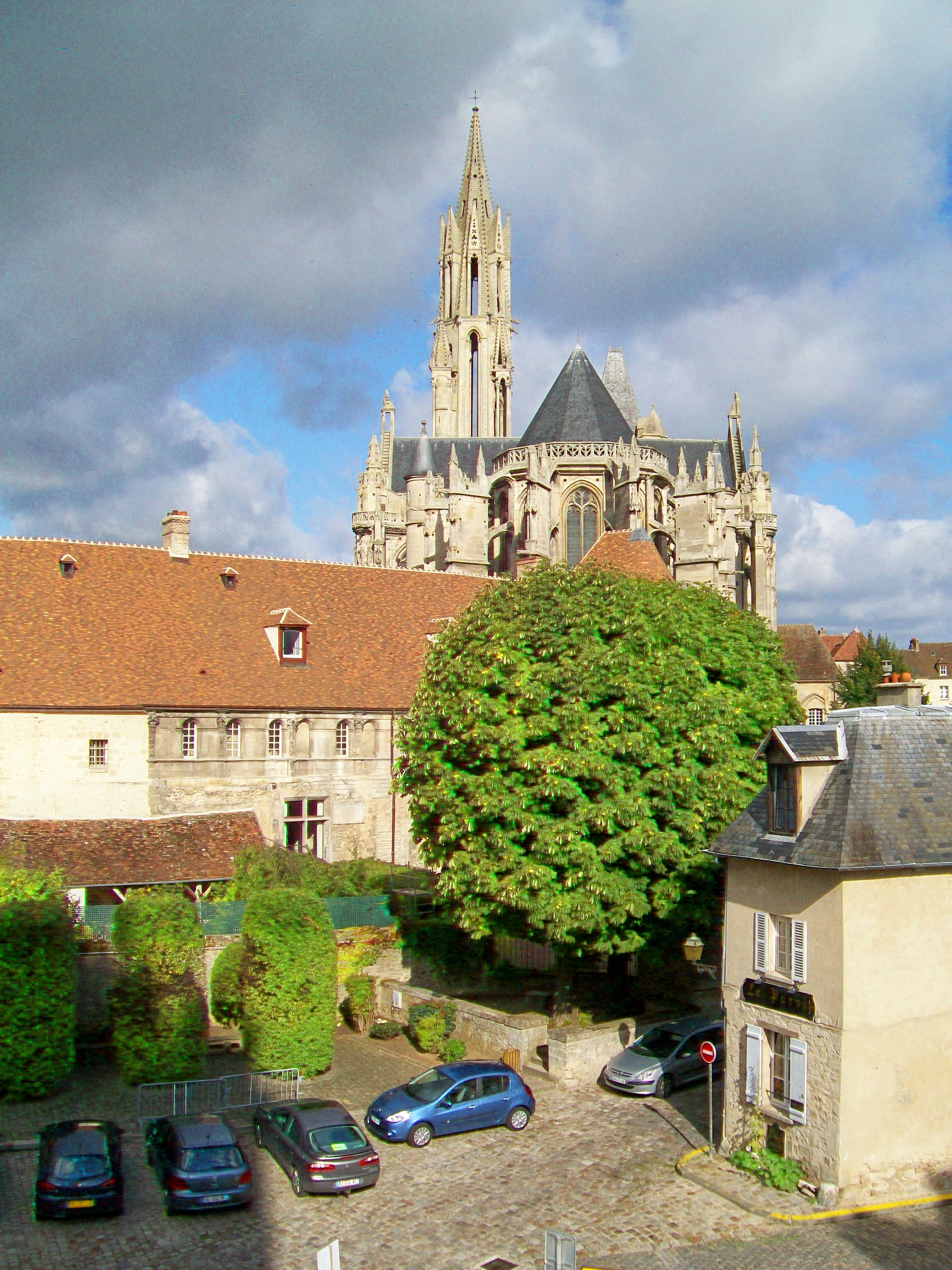 La cathédrale Notre-Dame et l'ancien évêché, depuis l'est (bibliothèque municipale).